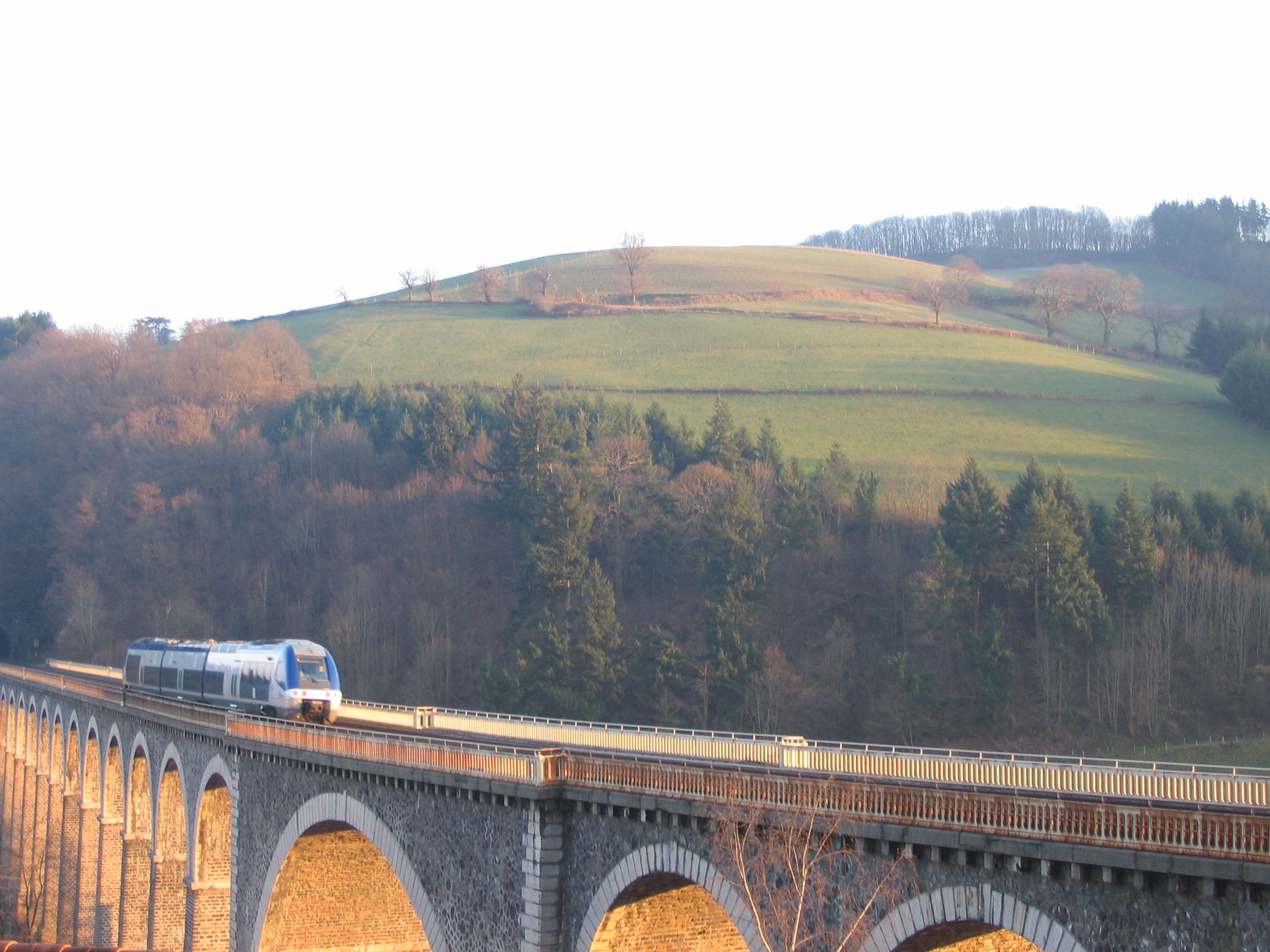 Un TER franchit le viaduc de Tarare (Rhône), direction Lyon -- on aperçoit tout à gauche l'entrée du tunnel en arrivant sur la gare.